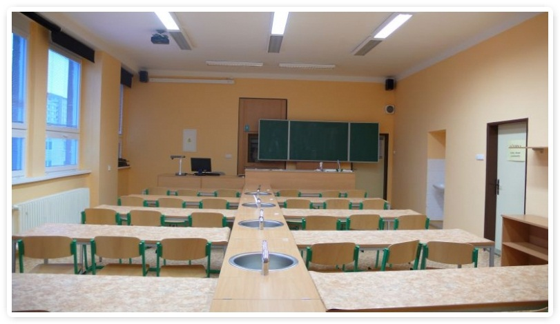 Učebna chemie na SPŠE V Úžlabině